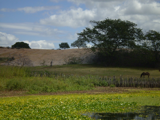 Foto da zona rural janduiense